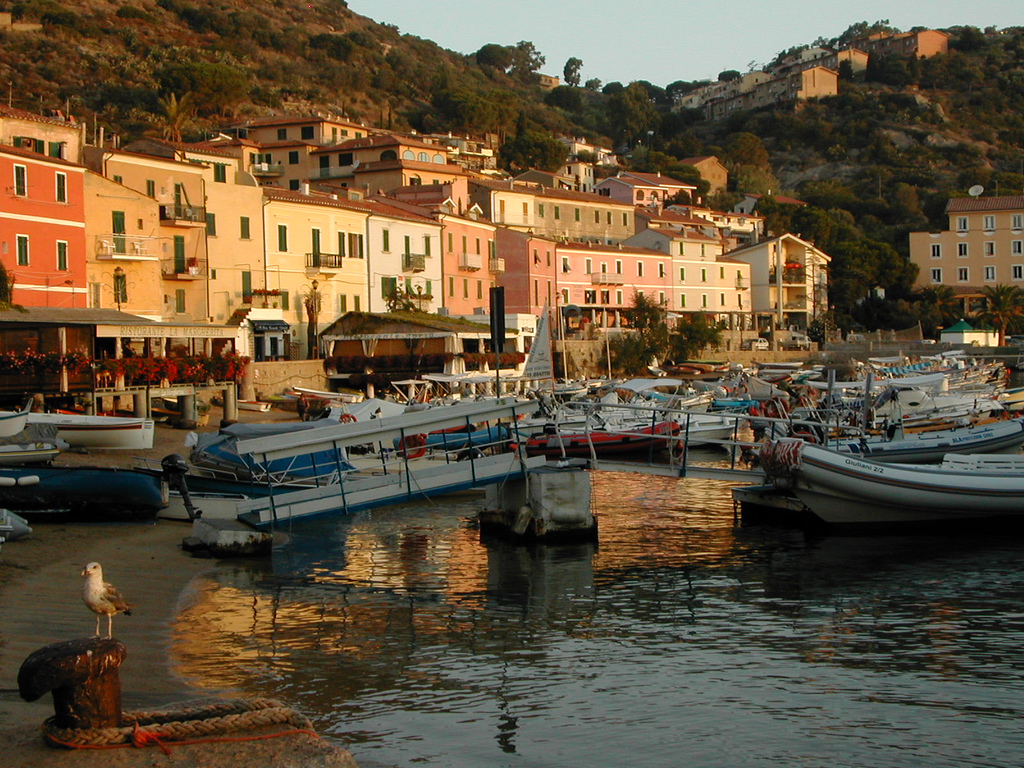 Giglio island, Giglio porto